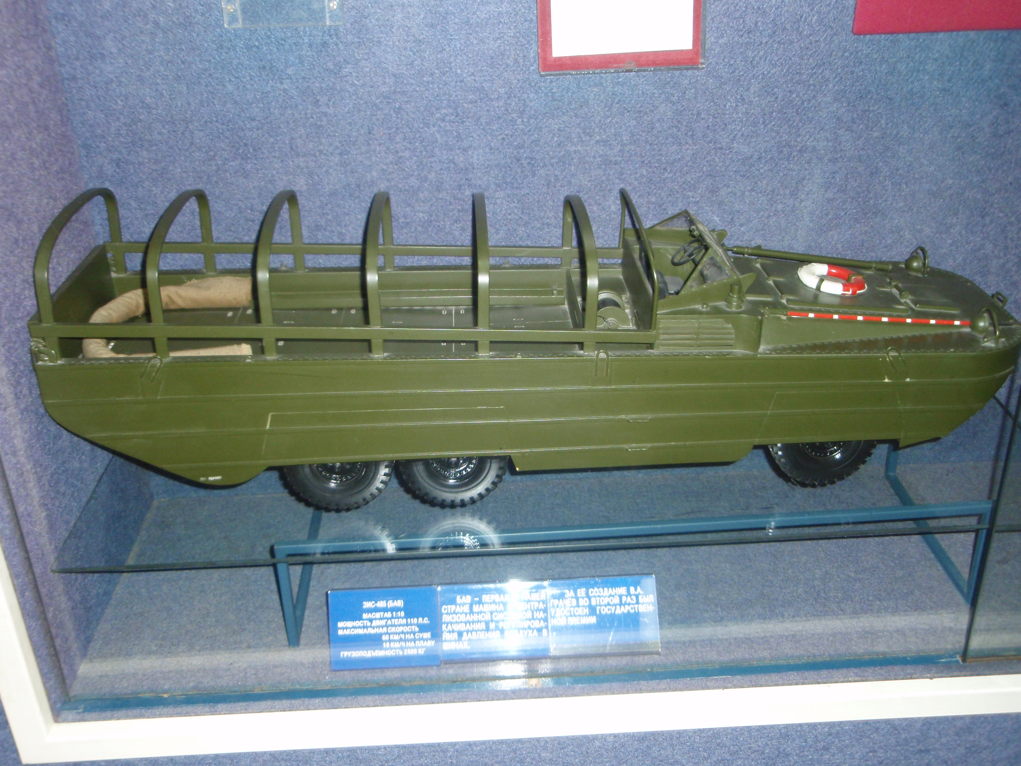 Советский автомобиль-амфибия ЗИС-485 (модель), Государственный Политехнический музей (г.Москва)